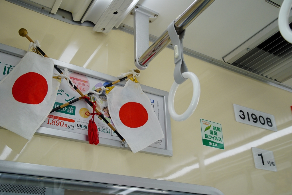 Osaka Metro（大阪市高速電気軌道）の地下鉄車両に掲示される日章旗(国旗)です